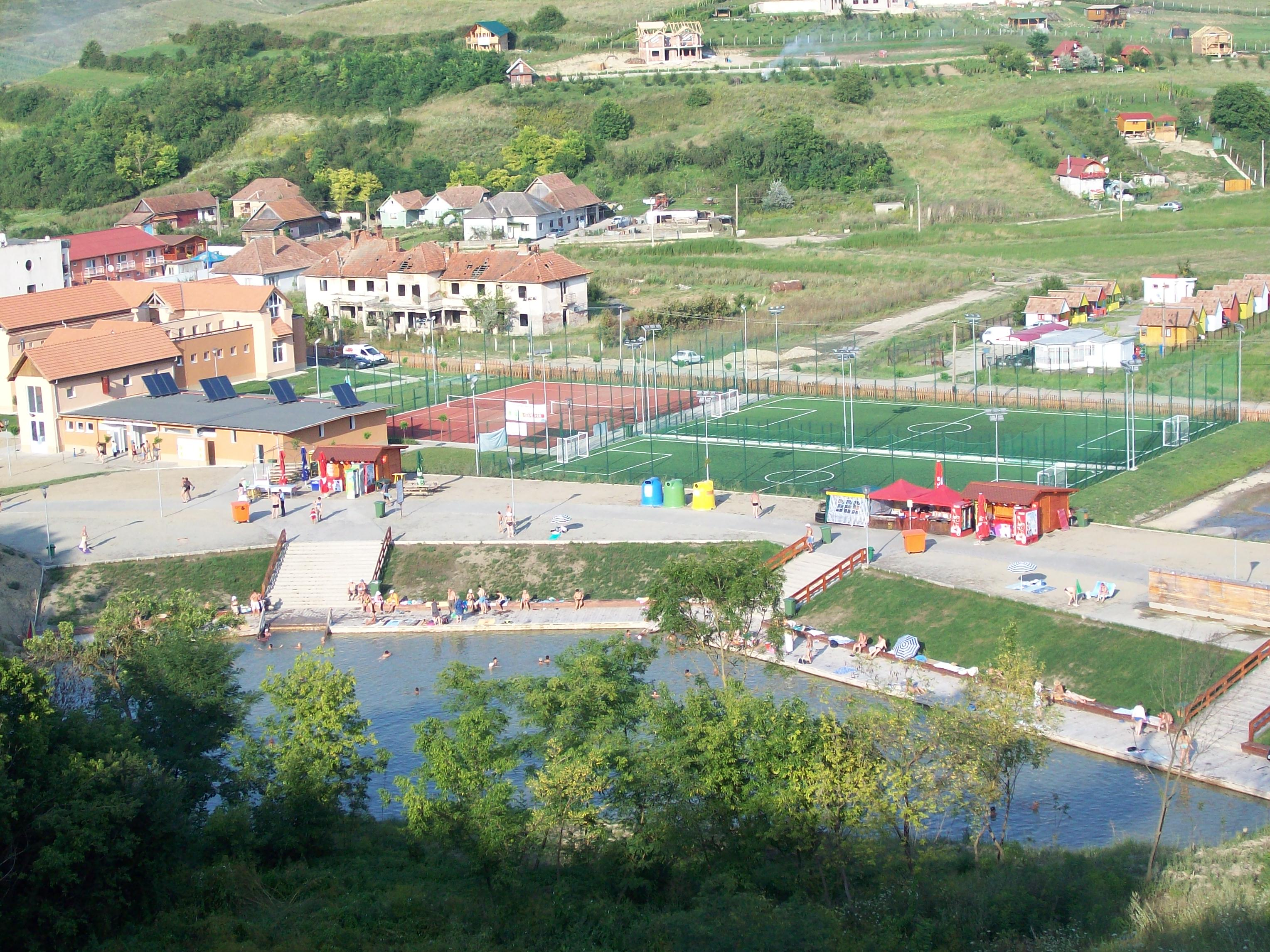 A fürdő felülnézetből.